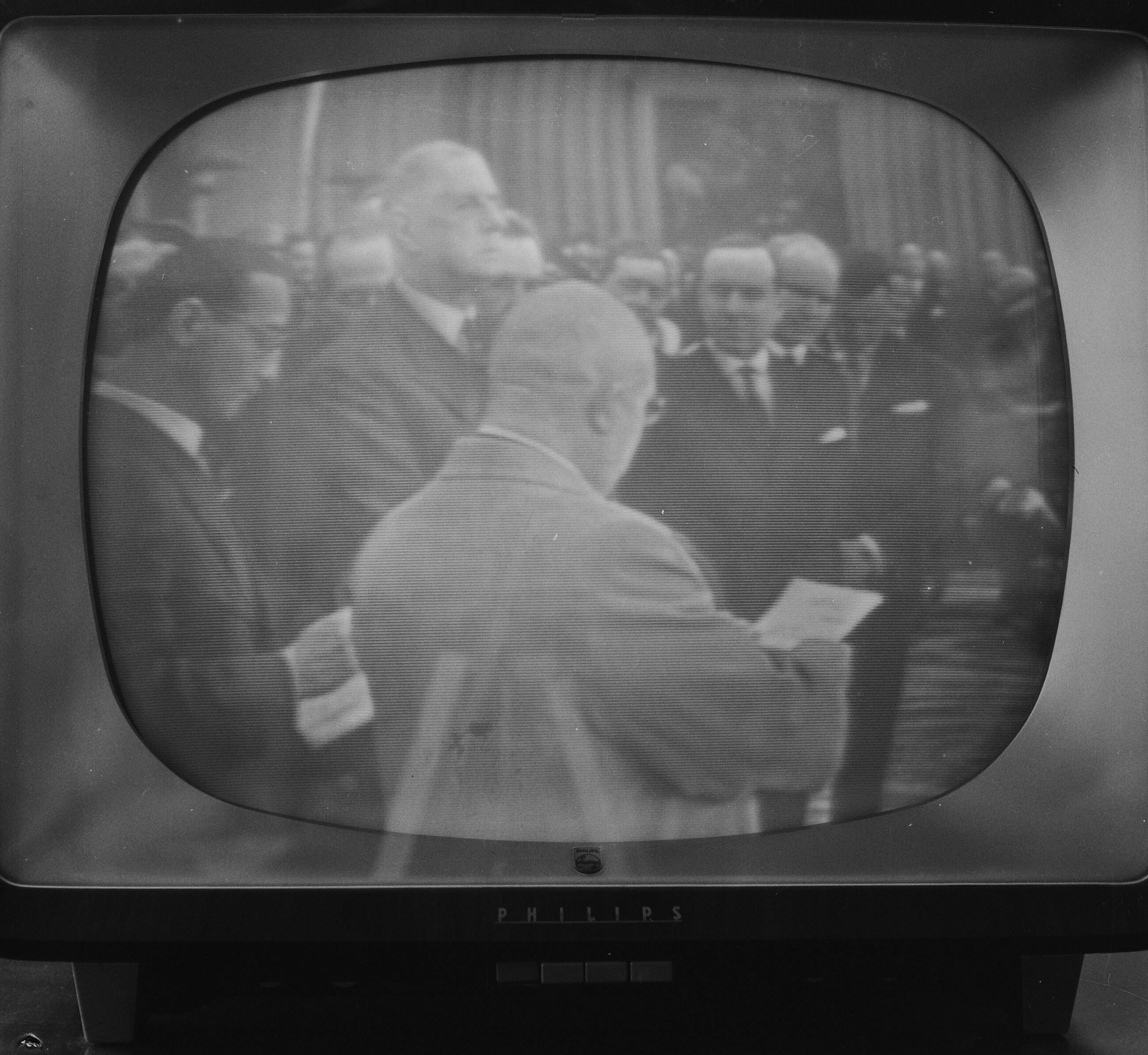 Collectie / Archief : Fotocollectie Anefo Reportage / Serie : [ onbekend ] Beschrijving : Aankomst premier Chroestsjev in Parijs Datum : 23 maart 1960 Locatie : Frankrijk, Parijs Trefwoorden : AANKOMST Persoonsnaam : premier Chroestsjev Fotograaf : Lindeboom, Henk / Anefo Auteursrechthebbende : Nationaal Archief Materiaalsoort : Negatief (zwart/wit) Nummer archiefinventaris : bekijk toegang 2.24.01.03 Bestanddeelnummer : 911-1157